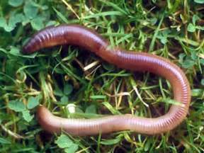 மண்புழு